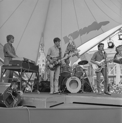 The Shorts, Nederland Muziekland 17 augustus 1983 in Nijmegen